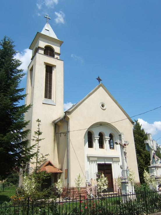 Hajmási templom